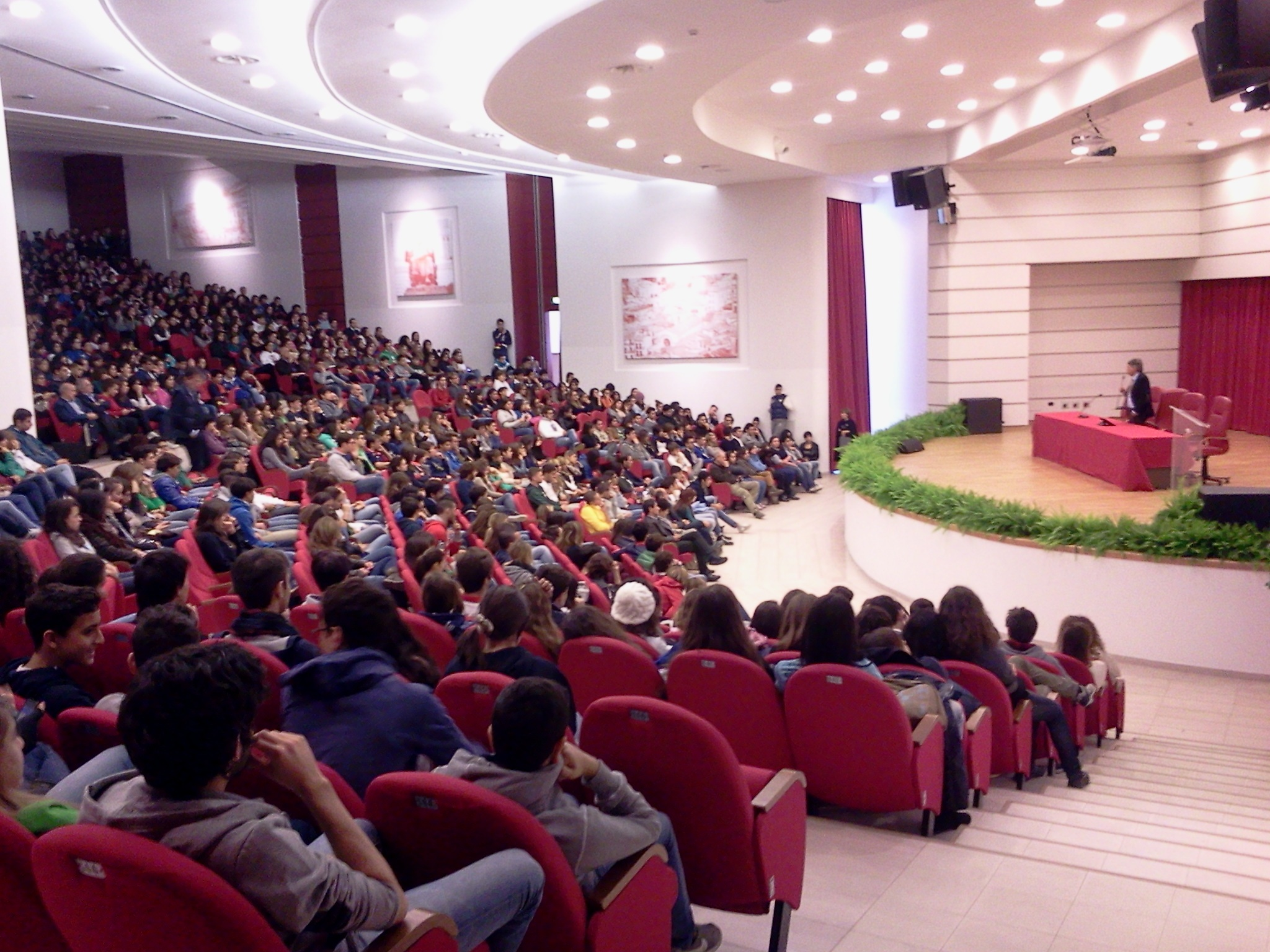 Vista panoramica dell'audotorium del Liceo Classico "B.Telesio" di Cosenza